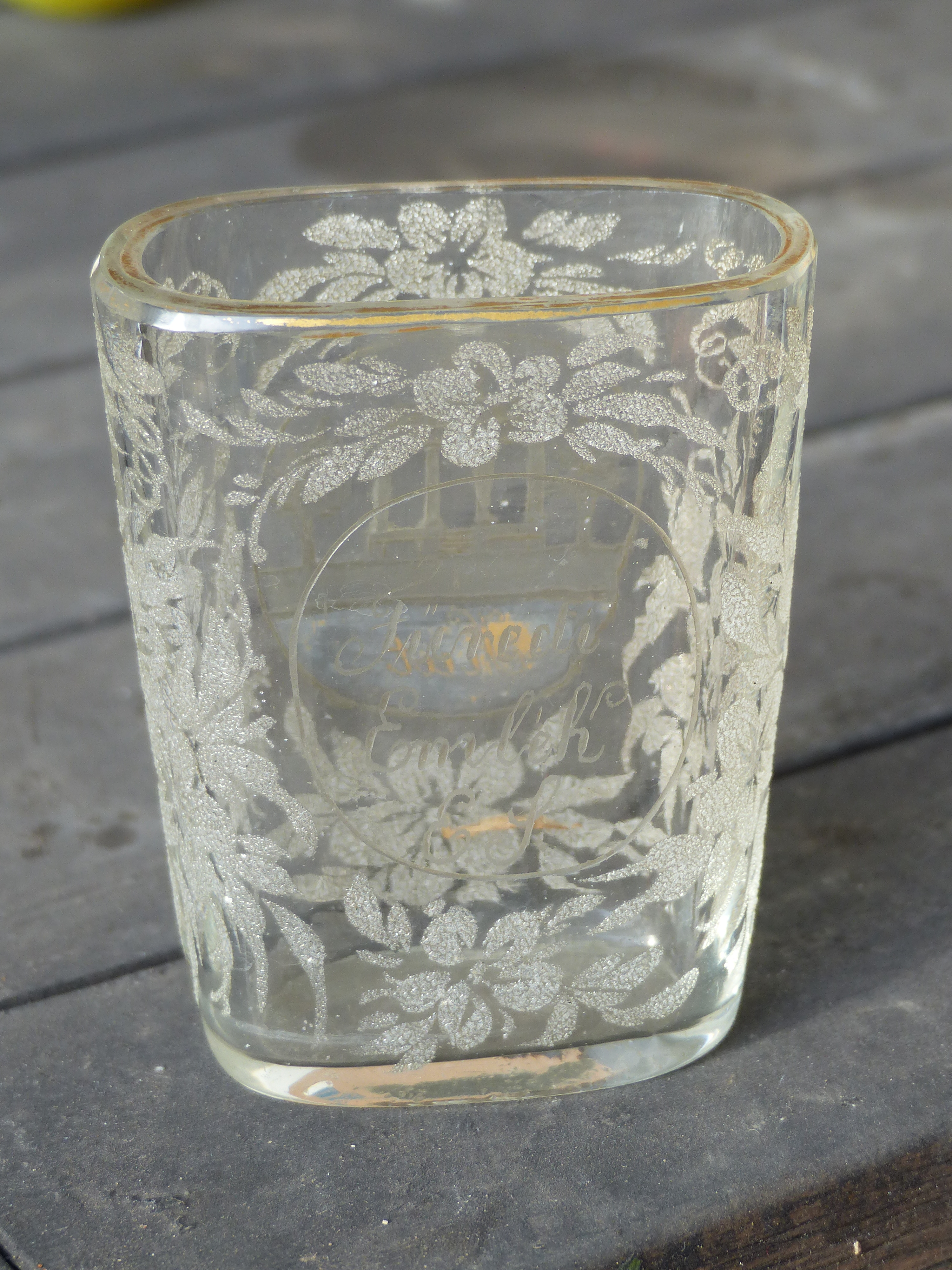 Balatonfüredi ivópohár. Füredi emlék. Hátoldalán (2): a Balatonfüredi Kossuth Lajos forrás, savanyúvíz kút. Klasszicista ivócsarnok. A kútházat tervezte és építette Lechner Mátyás 1800-ban, átépíttette Fruman Antal 1852-ben. Közzétéve a Yotel 894 DVD-n. Forrás